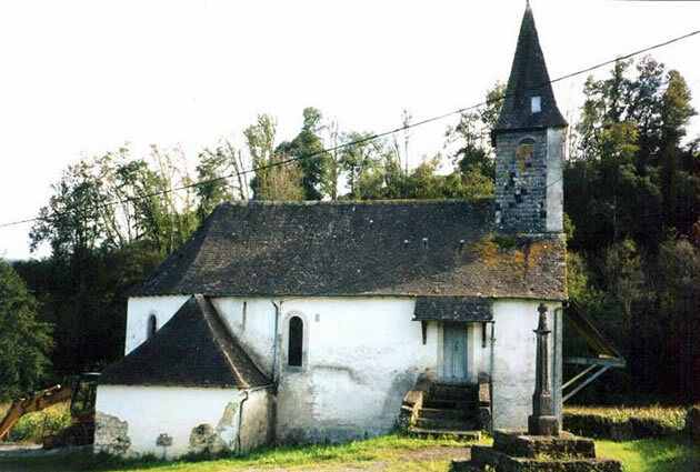 Chapelle de Roquiague Pyrénées).